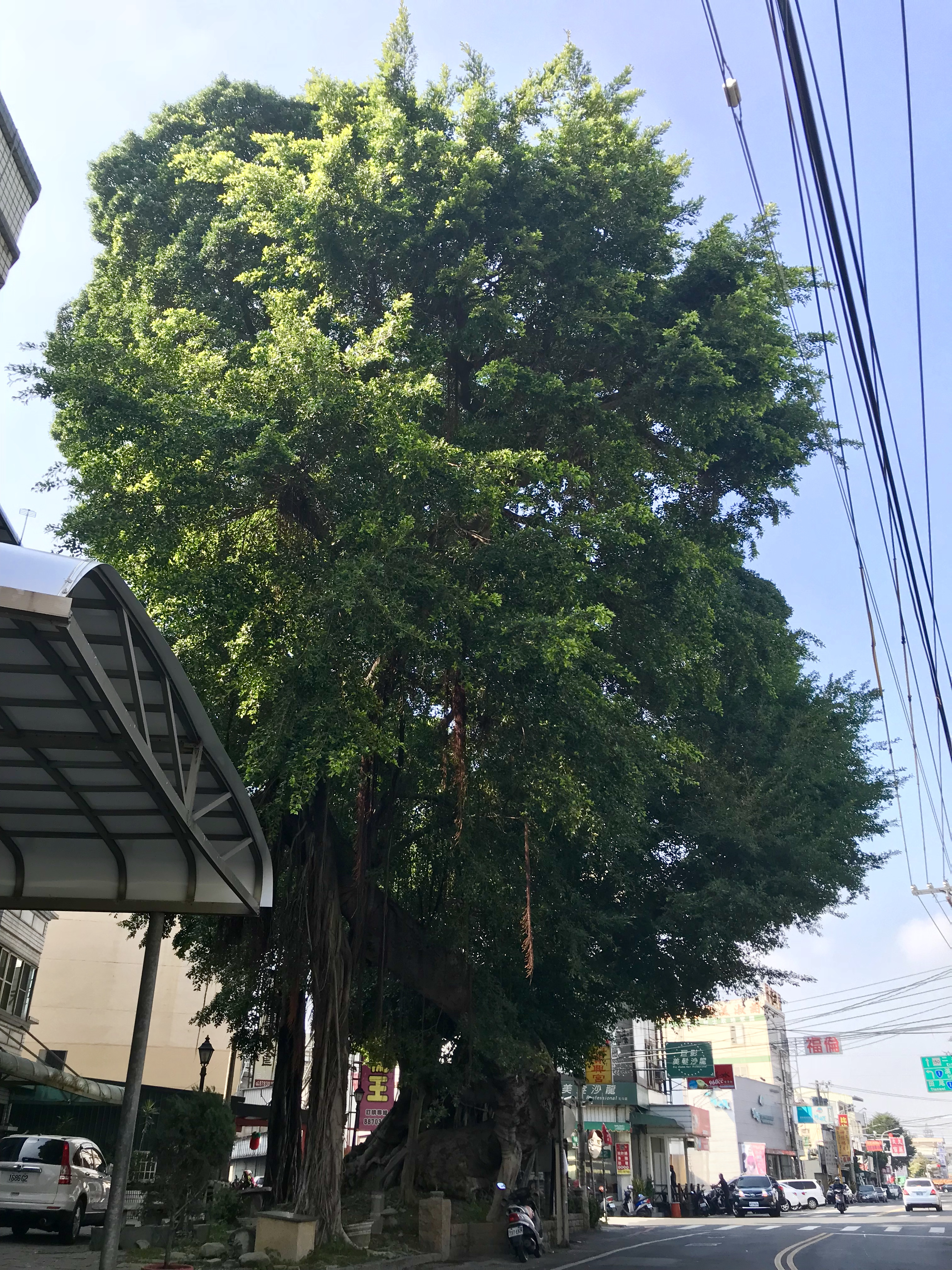 北斗大榕樹